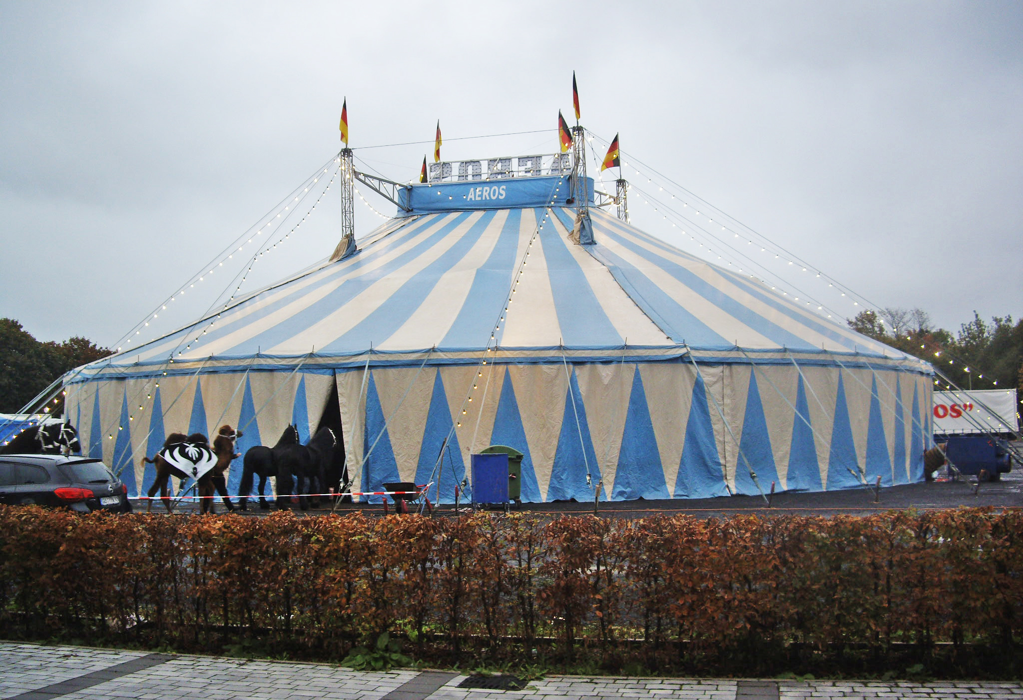 Zirkus Aeros auf dem Schützenplatz, Göttingen. Gastspiel 14.-18.10.2015.